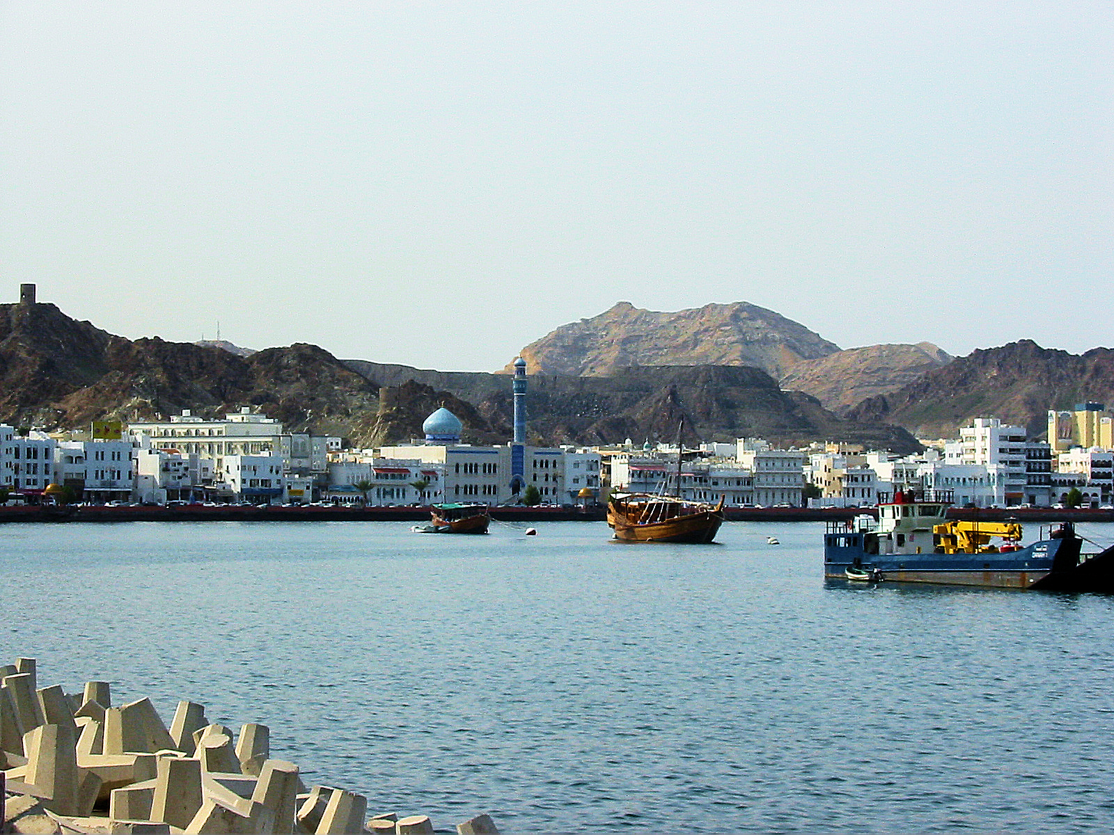 Matrah.